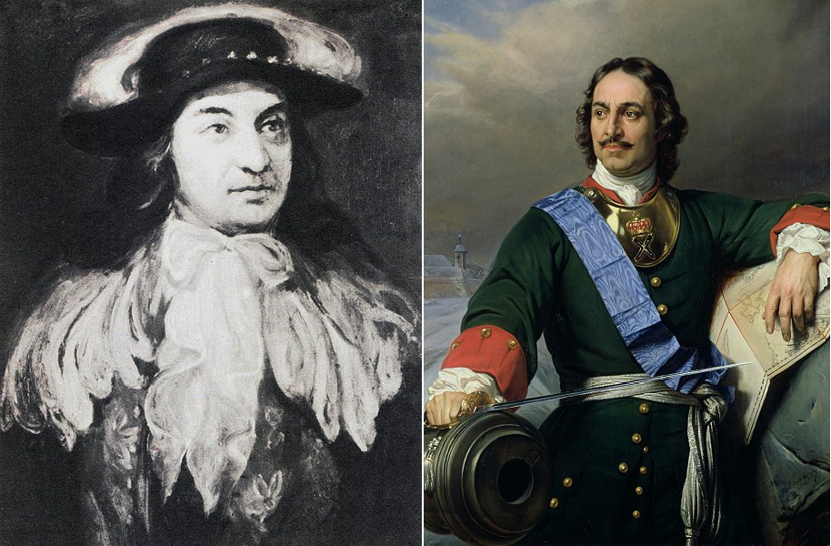 Իսրայել օրին և Ռուսաստանի ցար Պետրոս I-ը